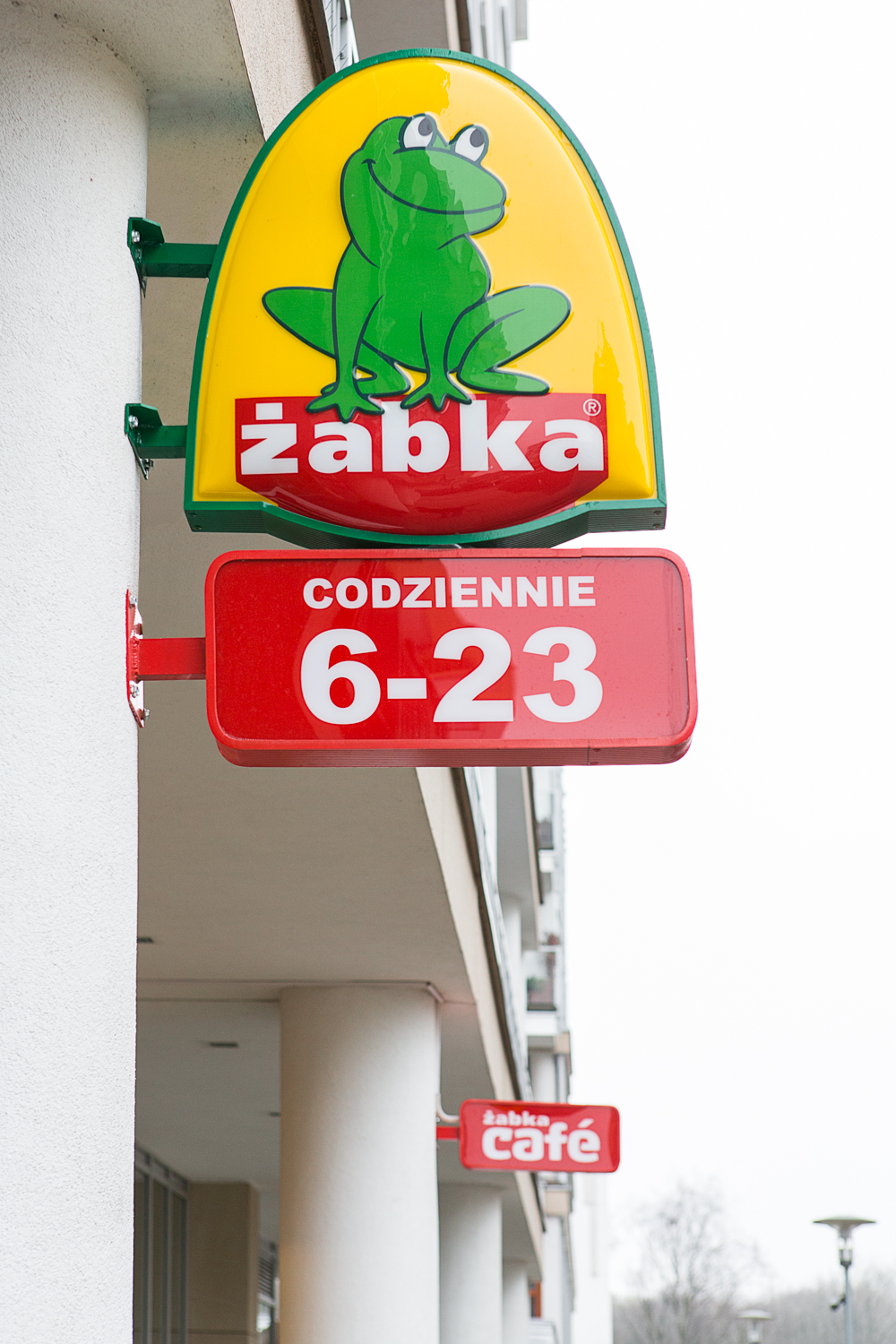 shop belonging to Żabka